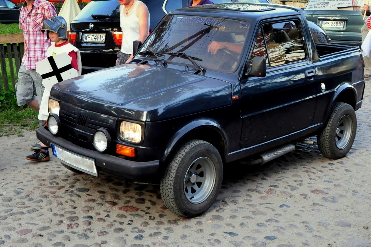 Udana przebudowa PF 126p na auto terenowe typu pick-up